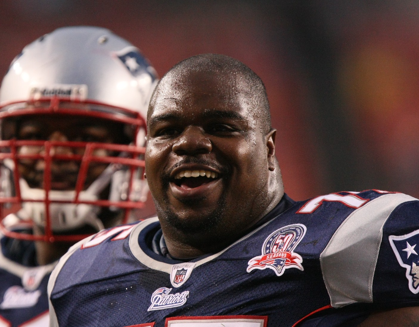 00205570.JPG